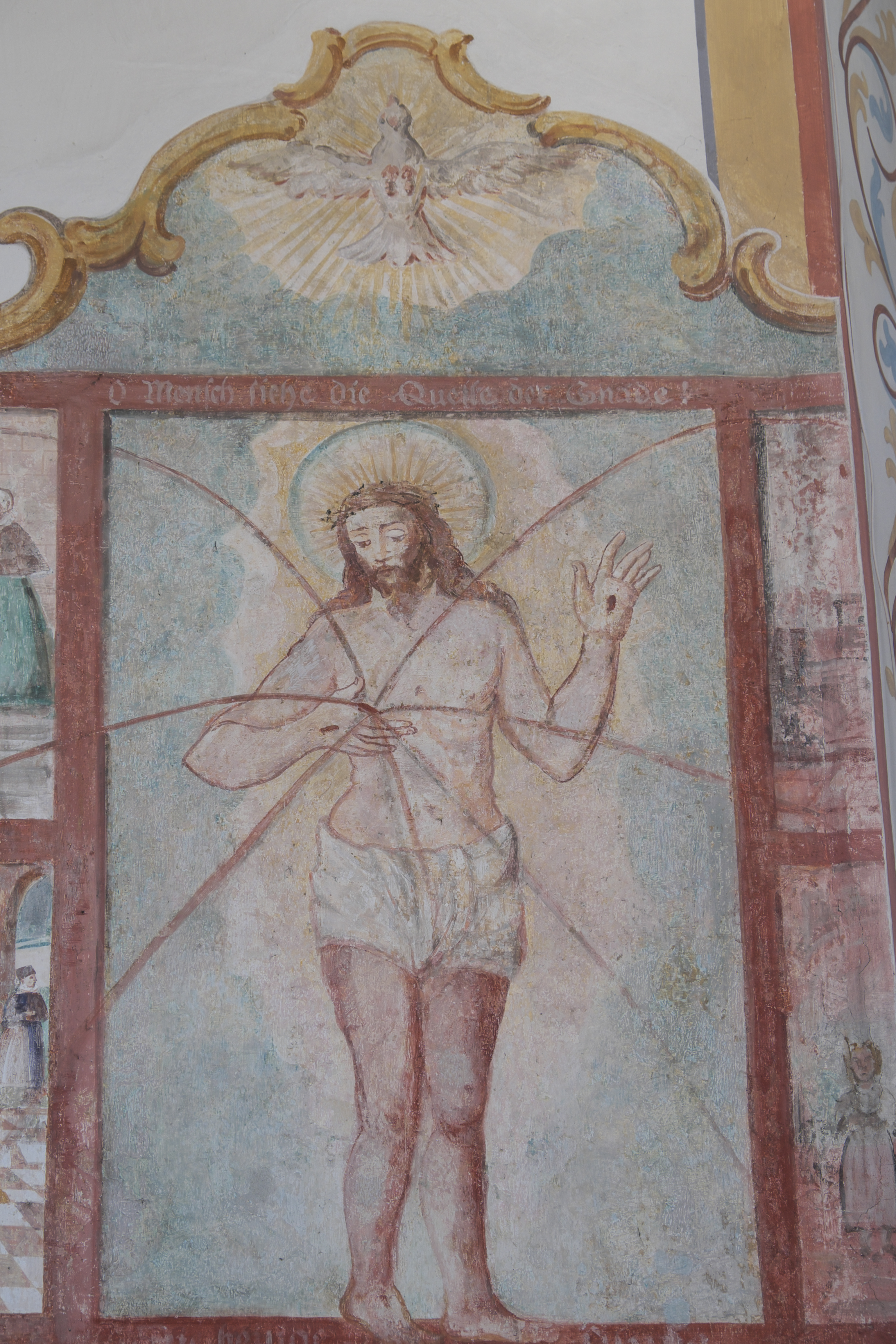 Katholische Pfarrkirche Mariä Geburt in Alling im Landkreis Fürstenfeldbruck (Bayern/Deutschland), Wandmalerei um 1600, im 18. Jahrhundert überarbeitet; Darstellung: Sieben Sakramente (Fragment, erhalten: Taufe, Beichte, Ehe, letzte Ölung)